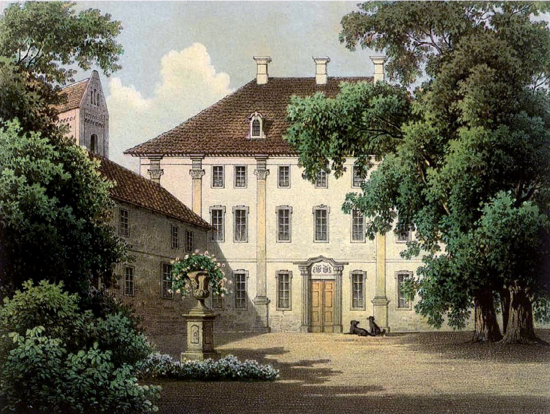 Schloss Schönhausen, Kreis Jerichow II, Provinz Sachsen, Lithografie aus dem 19. Jahrhundert